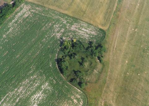 nagyigmánd, Hungary, aerialphotography